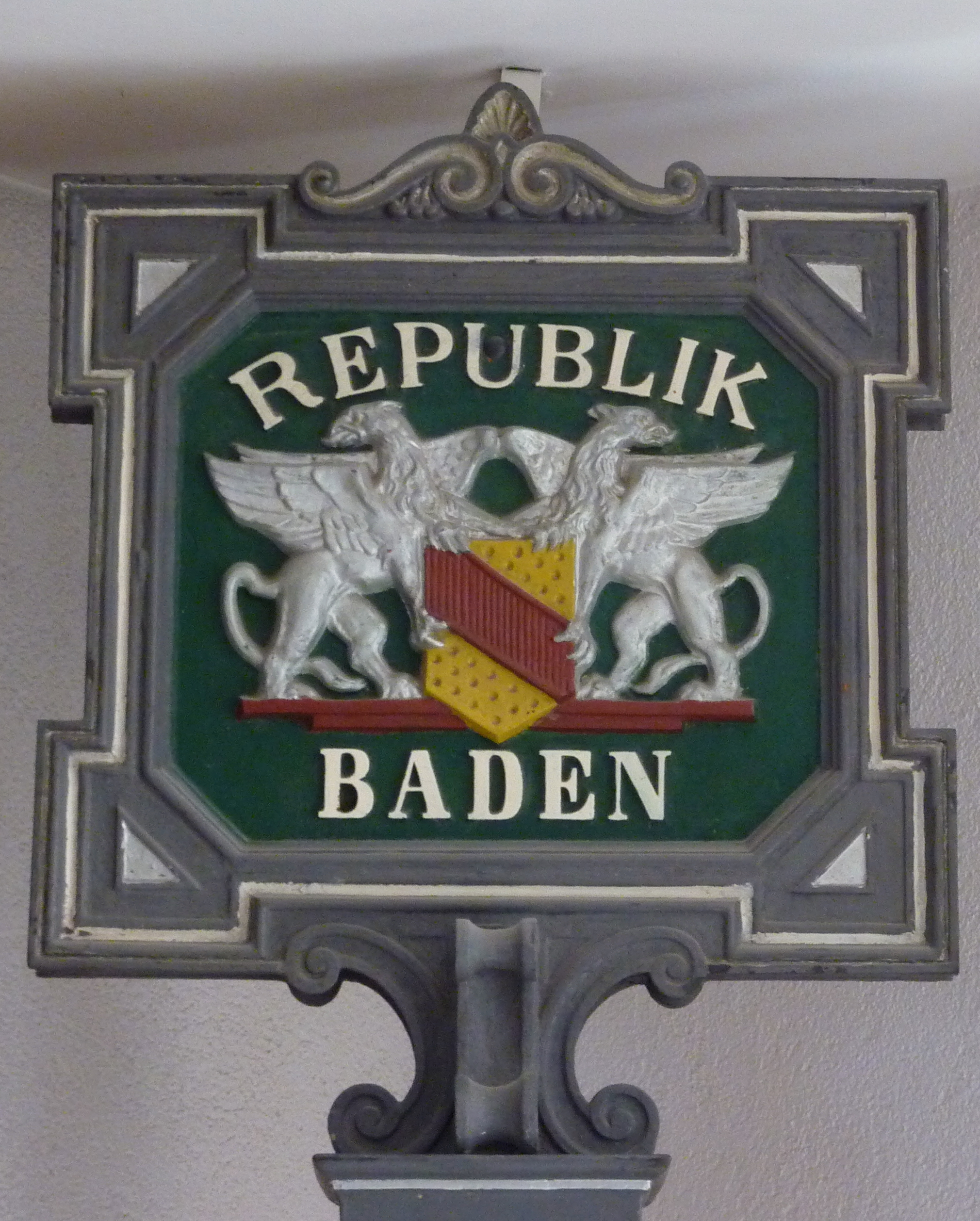 Rathaus in Knittlingen